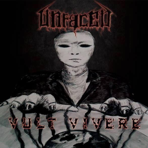 Okładka pierwszej płyty UnFaced - "Vult Vivere"